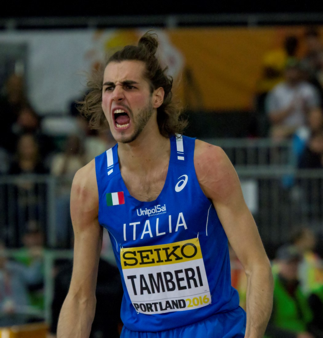 532 tamberi na de 2m33